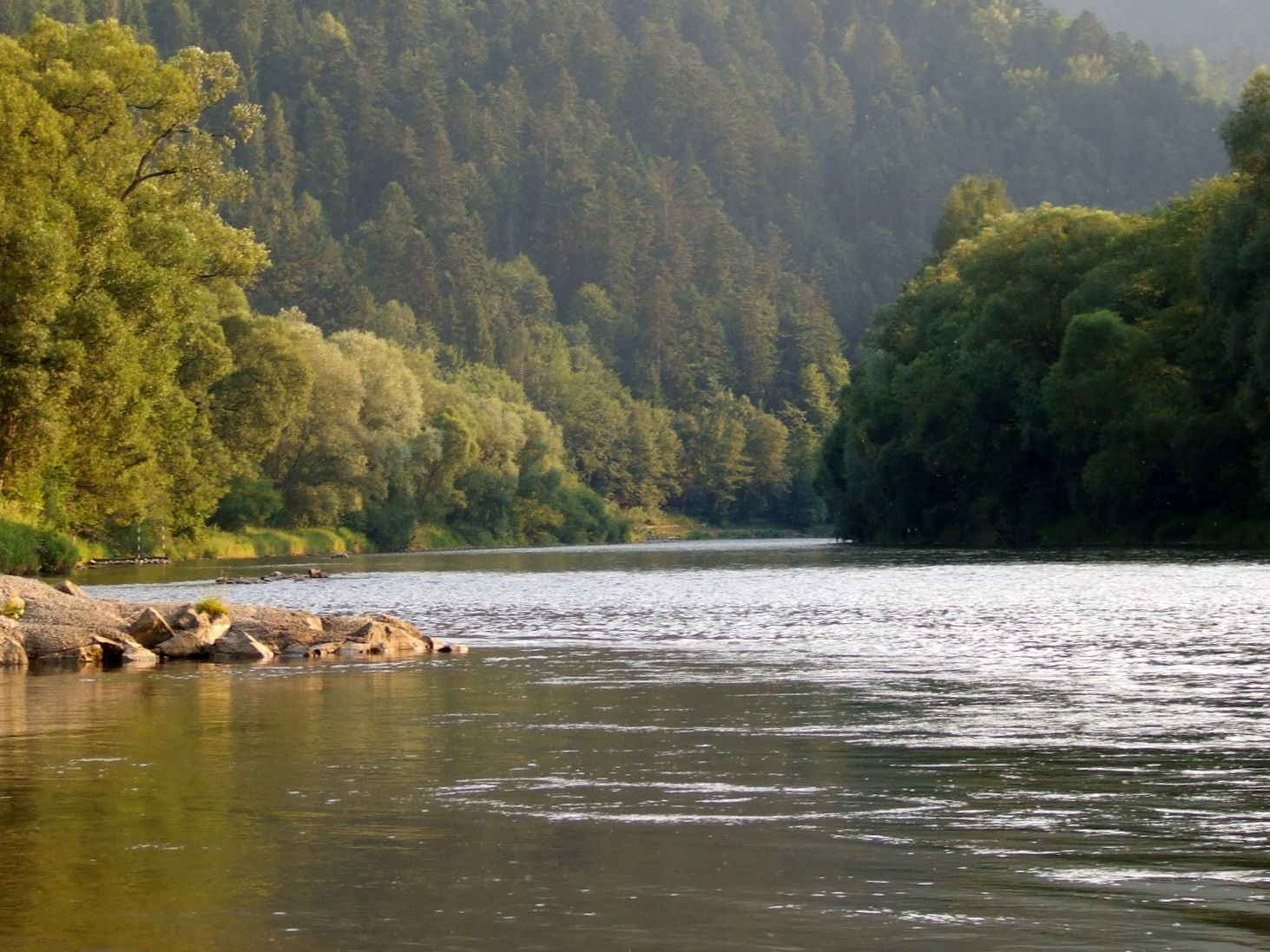 Rzeka Dunajec na wysokości miejscowości Szczawnica.